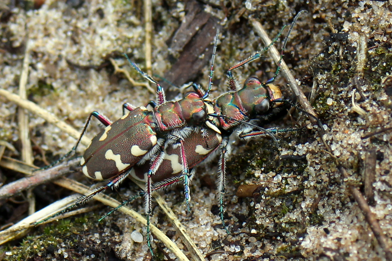 basterdzandloopkever in de kerkeindse Heide, Tilburg